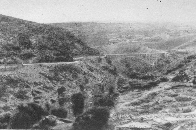 Pino del Oro (Zamora) - Puente sobre el Duero - España Turística y Monumental / Cuarto álbum / Las Bellezas de Castilla / Región Leonesa Cromo 70 x 50